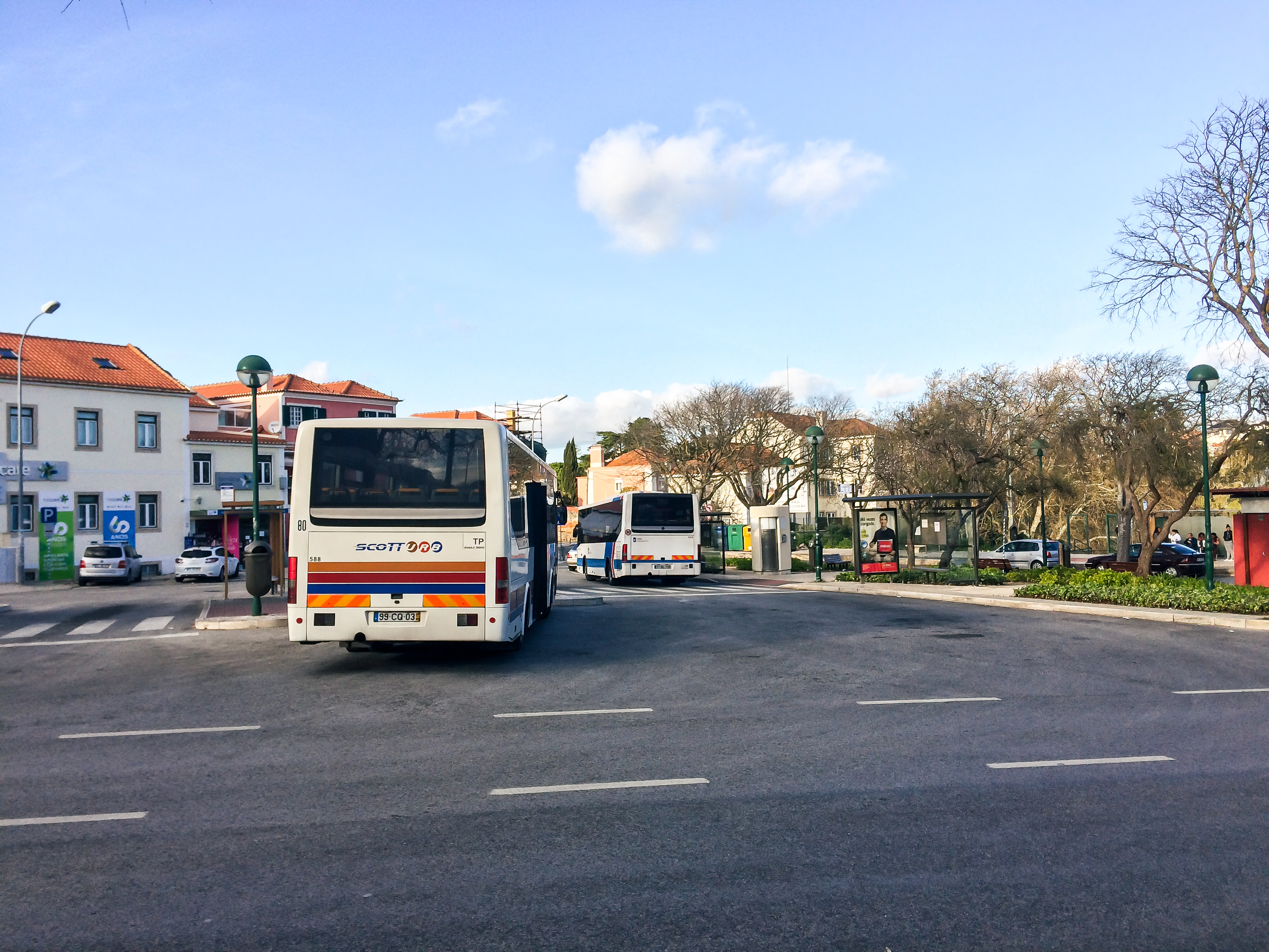 Terminal rodoviário de Oeiras.